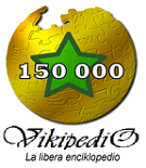 150000-a artikolo de la Esperanto-Vikipedio